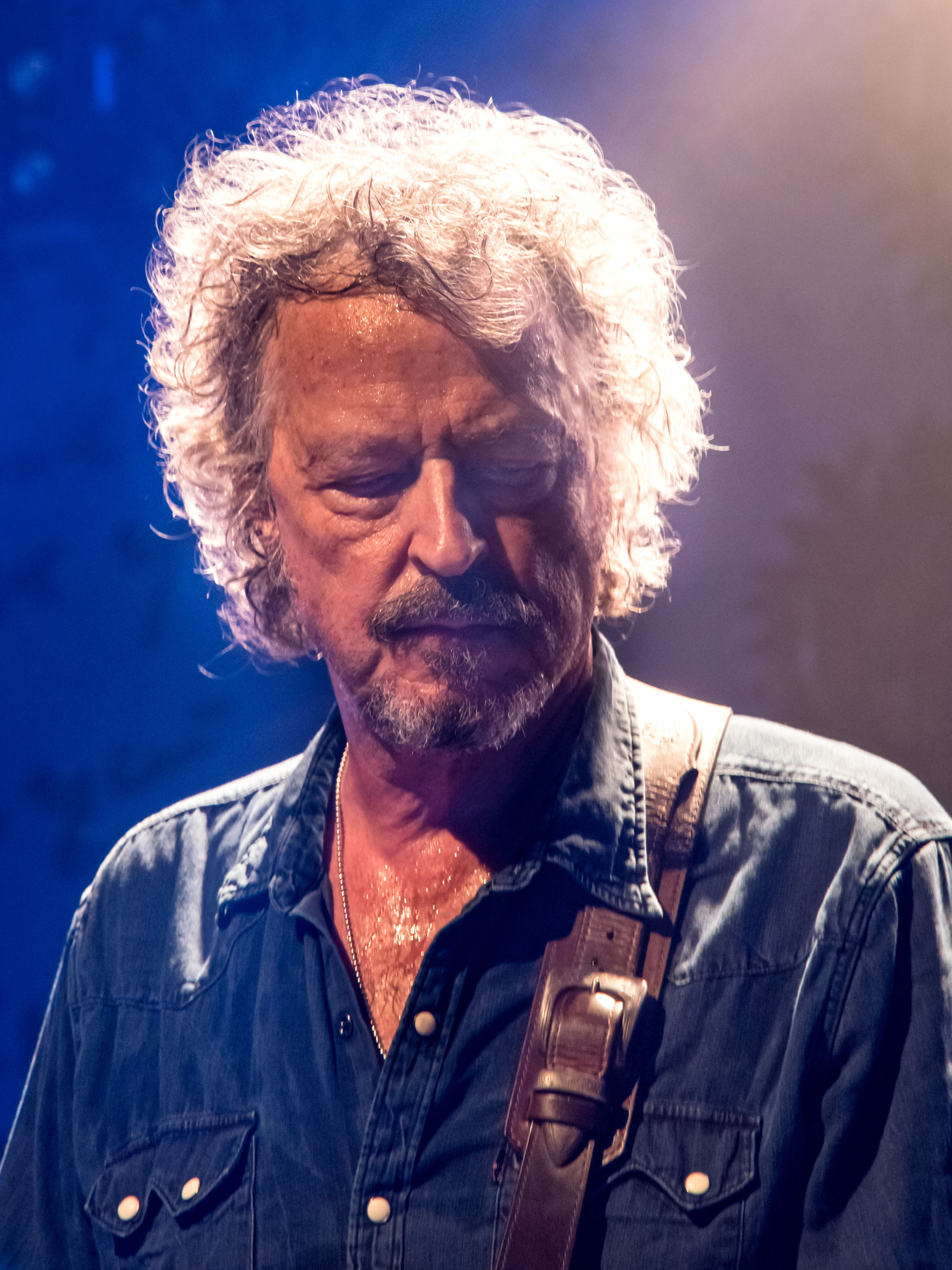 Bilder vom Zelt Musik Festival 2016 in Freiburg im Breisgau " Wolfgang Niedecken’s BAP" kurz BAP